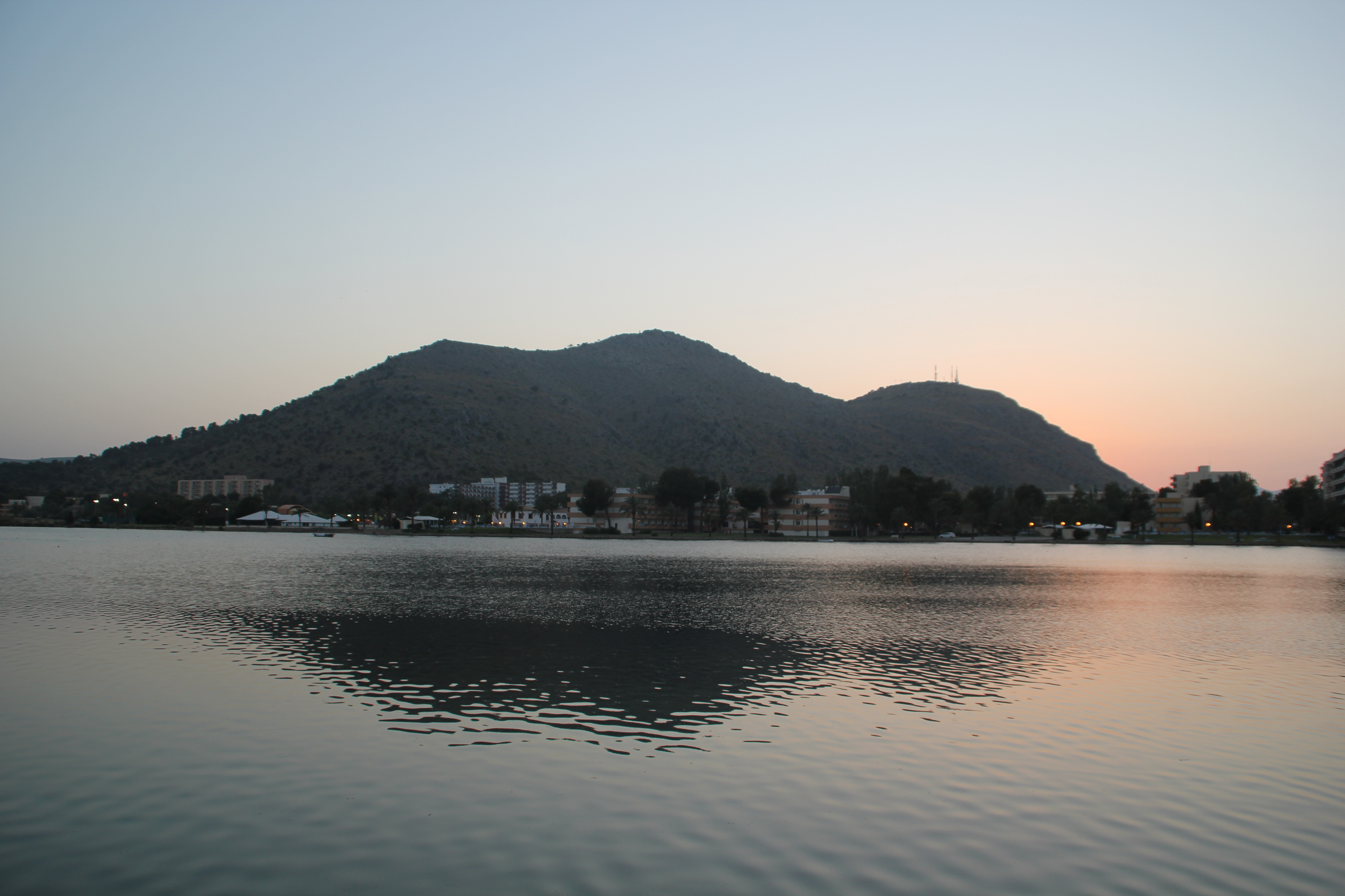 Crepuscle amb el Puig de Sant Martí